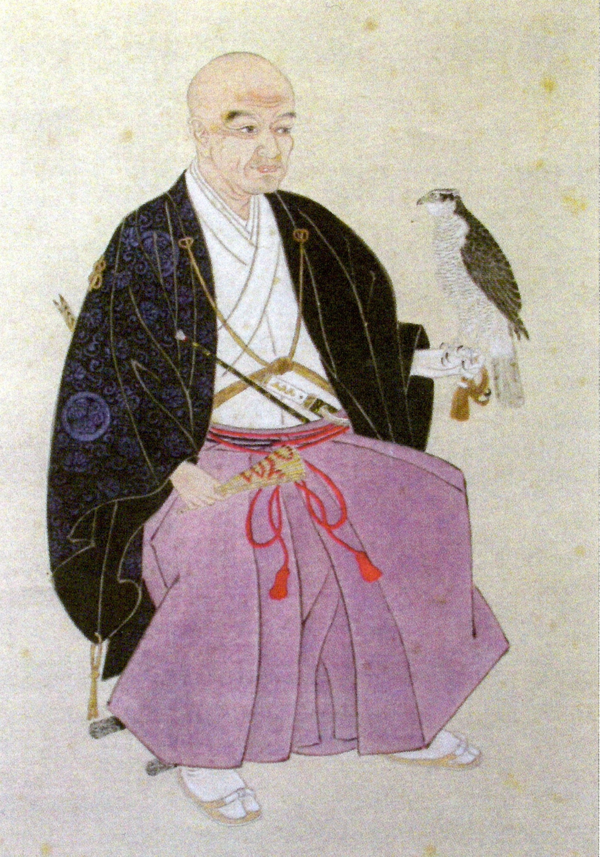 松平斉斎(斉貴)の肖像。